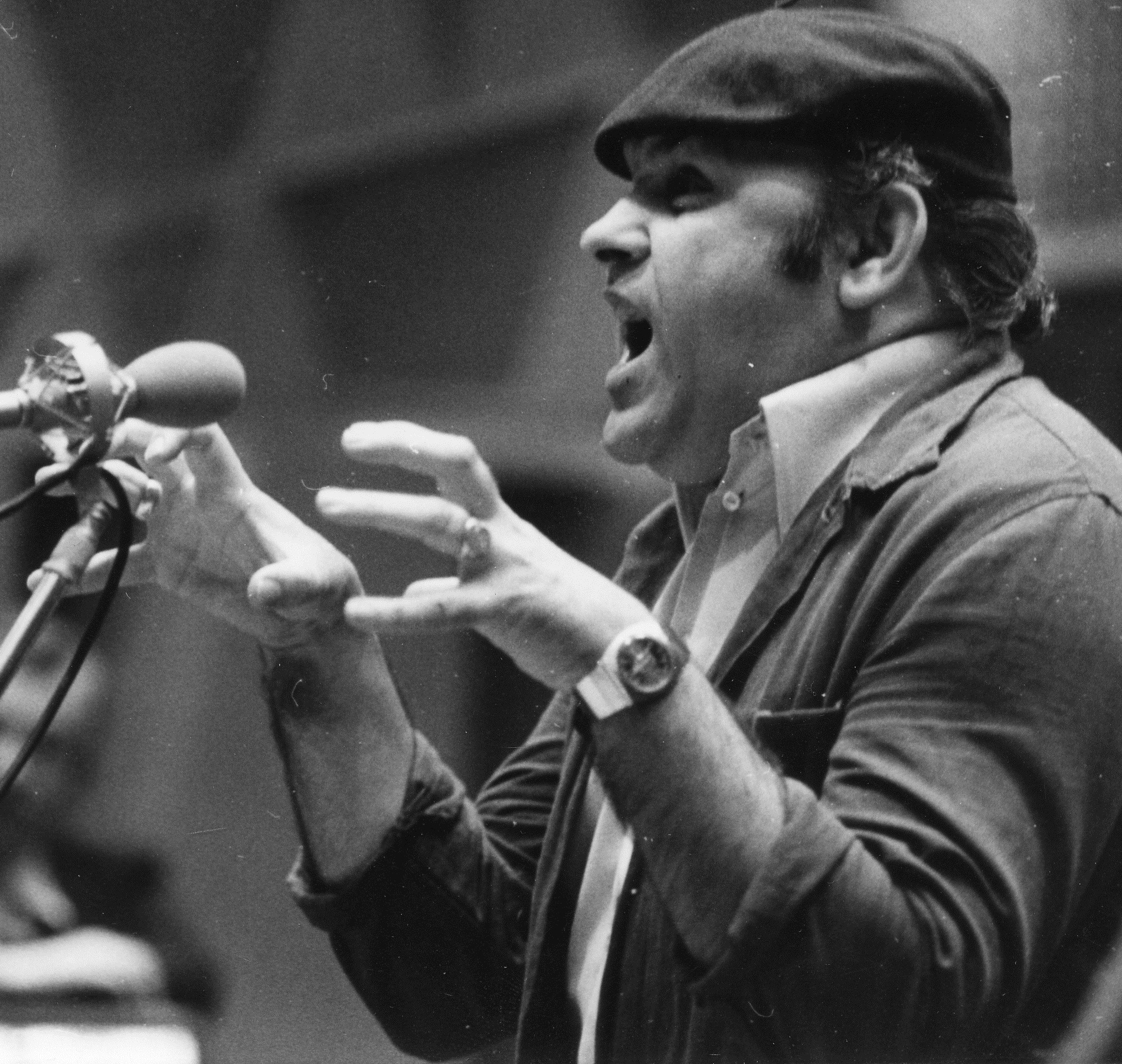 Hofi Géza humorista a Magyar Rádió stúdiójában (Budapest)